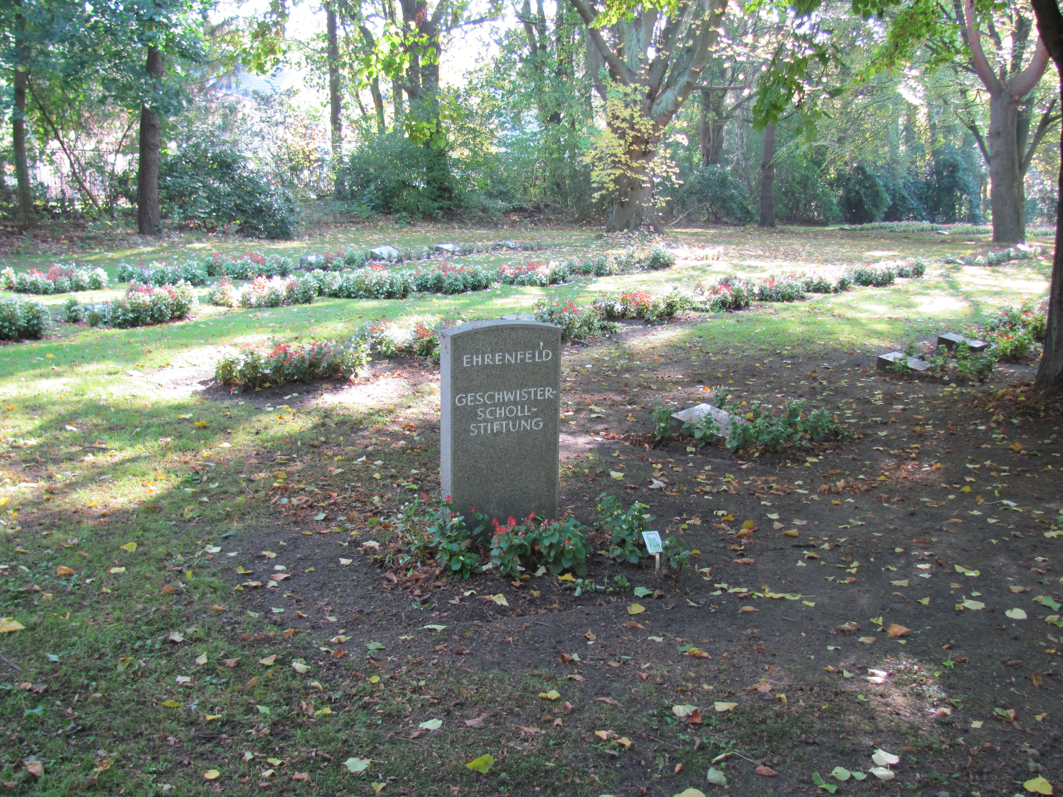 Ehrenfeld der Geschwister-Scholl-Stiftung auf dem Friedhof Ohlsdorf